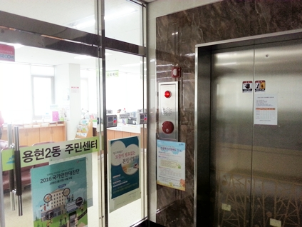 용현2동 주민센터